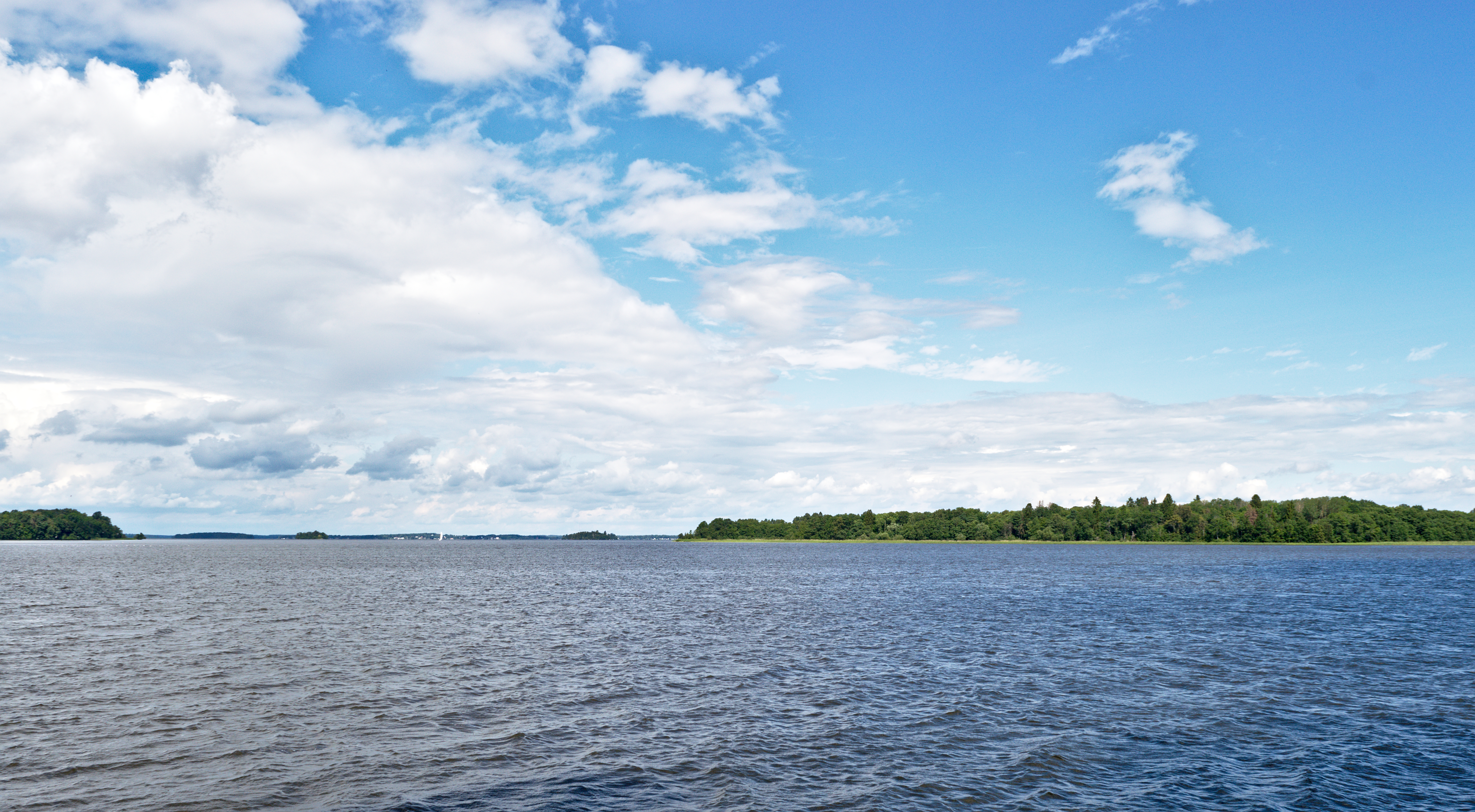 Naturreservatet Ridö-Sundbyholmsarkipelagen. Räfsgarn till vänster, Tidö-Lindö i mitten och Sundbyholmsön till höger.